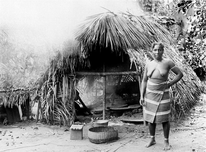 Repronegatief. Een Marronvrouw in pangi gekleed, staat voor haar werkhut. In veel dorpen hebben de vrouwen in verschillende delen van het dorp een werkhut. De vrouw op de foto is drie grote ronde cassavebroden aan het bakken.. Portret van een Marron vrouw voor haar hut